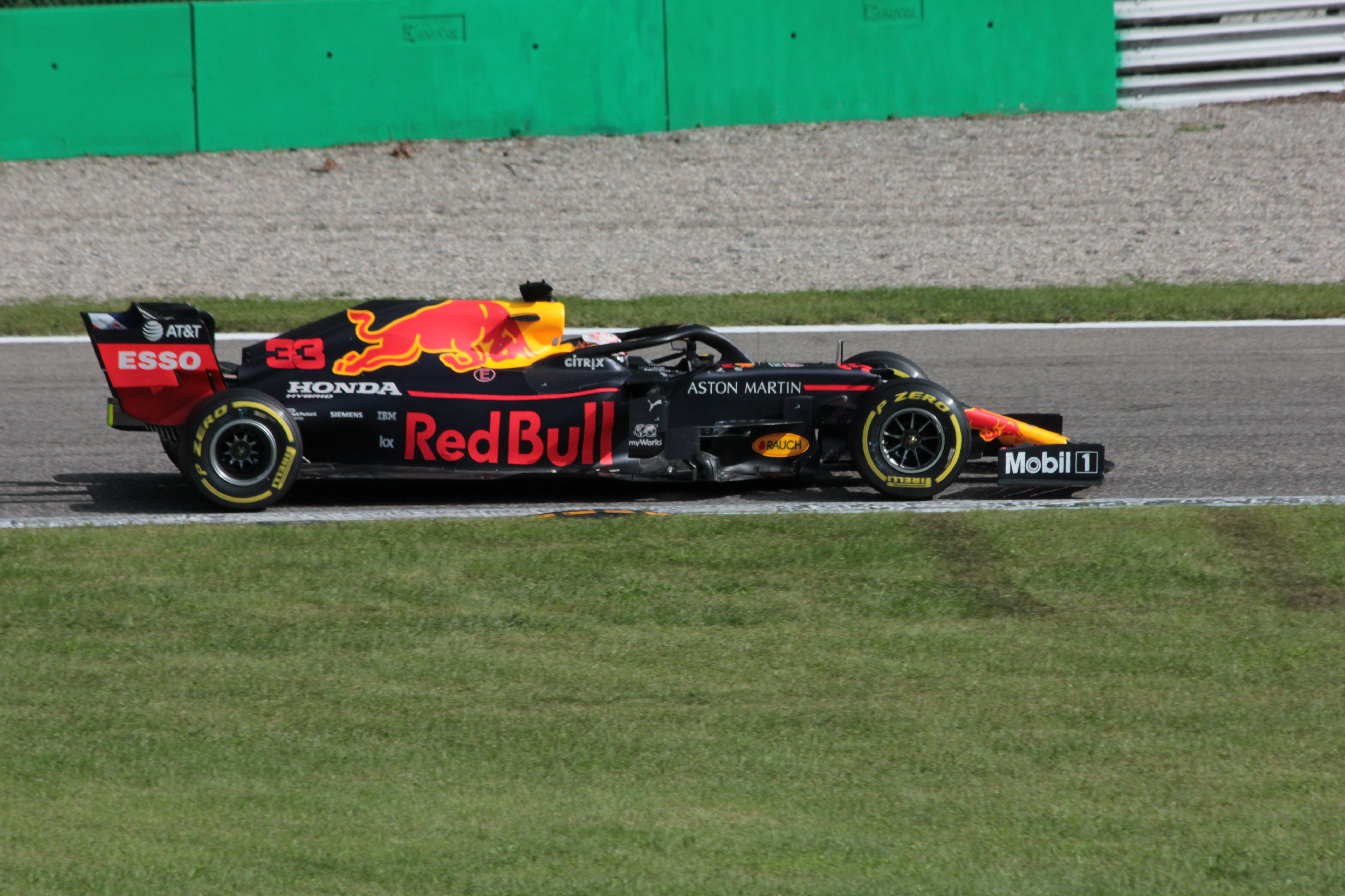 Max Verstappen alla guida della sua Red Bull durante il Gran Premio d'Italia 2019.